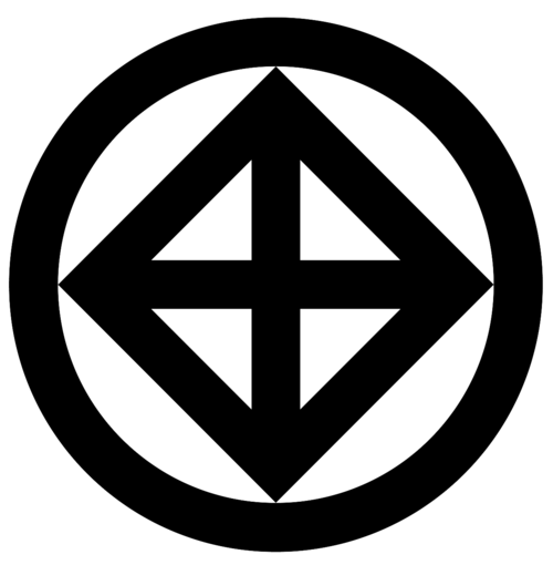 柳心照智流的流派家紋